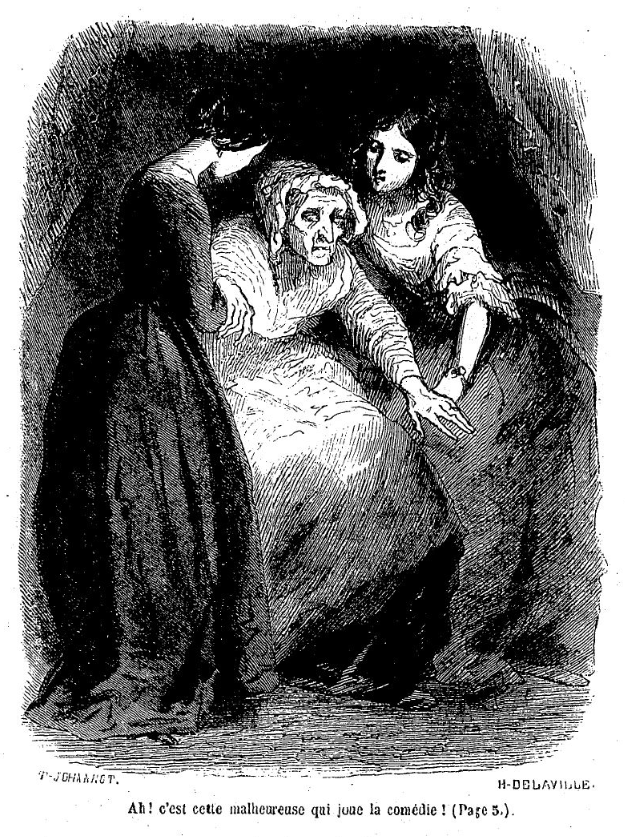 Illustrations de Tony Johannot pour une réédition du roman "Pauline" de George Sand en 1852 dans le tome 2 des "Oeuvres illustrées de George Sand", éditées à Paris aux éditions Jules Hetzel entre 1852 et 1856. Oeuvre numérisée en mode image sur Gallica, portail de la Bibliothèque nationale de France, mis en ligne le 15 octobre 2007. La notice de l'ouvrage précise qu'il est dans le domaine public.